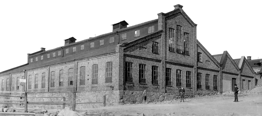 Gjuteri- och Mekaniska Werkstads Aktiebolaget i Karlskrona år 1899